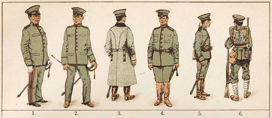 Это изображение было использовано для иллюстрирования статьи «Китай» опубликованной в двенадцатом томе «Военной энциклопедии», который был издан книгоиздательским товариществом И. Д. Сытина в 1913 году в столице Российской империи городе Санкт-Петербурге. ФОРМЫ ОБМУНДИРОВАНИЯ. 1) Генерал. 2) Штаб-офицер пехоты. 3) Обер-офицер в пальто. 4) Унтер-офицер артиллерии. 5) Рядовой кавалерии. 6) Рядовой пехоты.